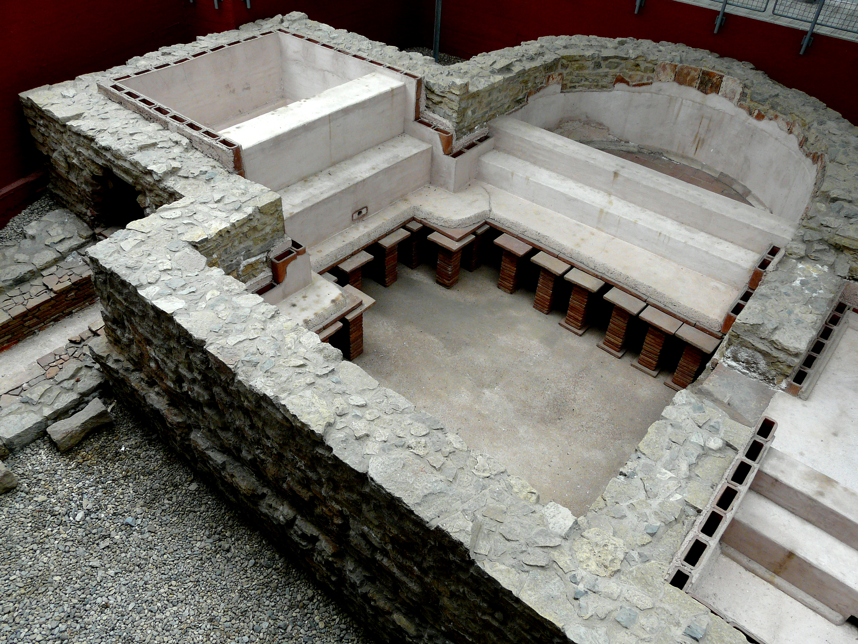 Caldarium mit Hypokaustum und Piscinae der Thermen des Kastells Osterburken im Römermuseum Osterburken